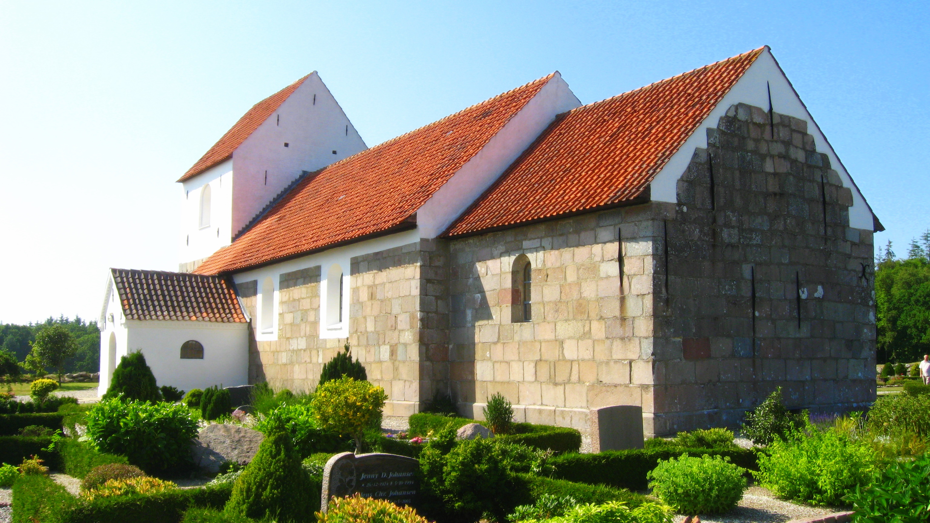 Lerup Kirke, Jammerbugt Kommune